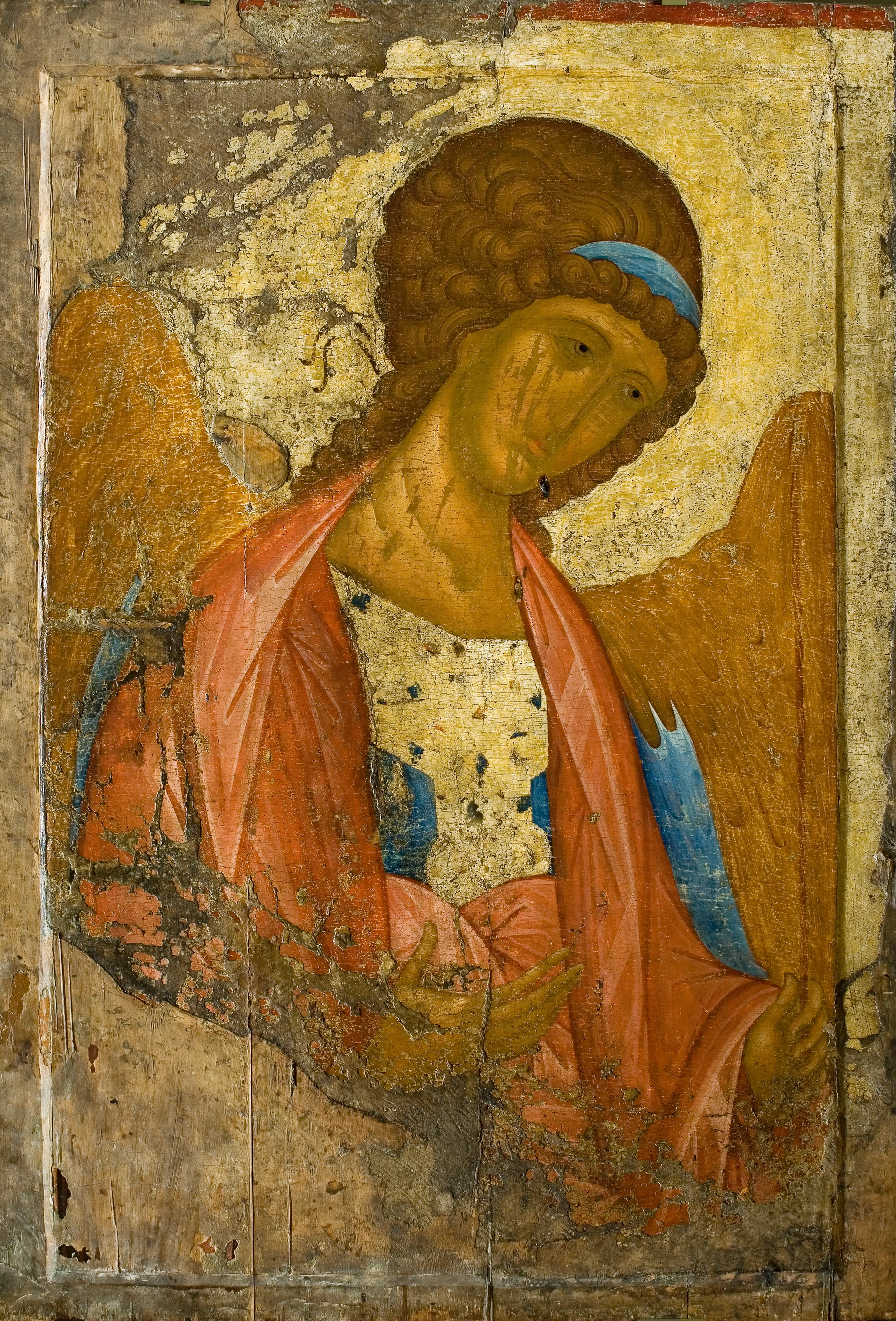 Так называемый Звенигородский чин – один из самых прекрасных иконных ансамблей древнерусской живописи. Чин состоит из трех поясных икон – Спас, Архангел Михаил и Апостол Павел. Чин мог входить в иконостас как княжеского Успенского, так и соседнего Рождественского собора Саввино-Сторожевского монастыря, ктитором которого был звенигородский князь. Живопись Звенигородского чина отличает особая чистота цвета, благородство тональных переходов, светоносность колорита. Свет излучают золотые фоны и нежная плавь светлых ликов, чистые оттенки охры, голубые, розовые, зеленые тона одежд. Иконы происходят из подмосковного Звенигорода, когда-то входили в семифигурный Деисус. Сохранившиеся три иконы были обнаружены реставратором Г.О.Чириковым в 1918 году в дровяном сарае близ Успенского собора на Городке во время обследования экспедицией Центральных государственных реставрационных мастерских древнего княжеского храма Юрия Звенигородского, второго сына Дмитрия Донского.